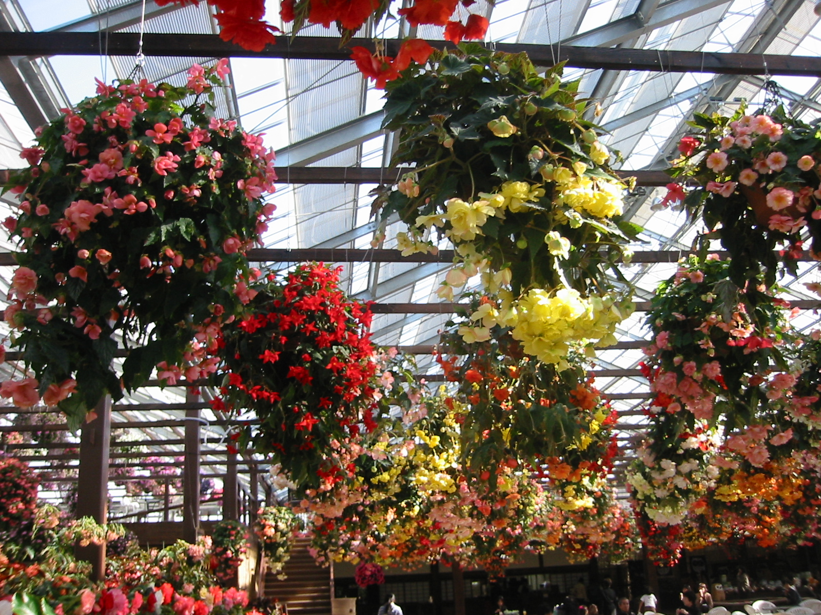 神戸花鳥園